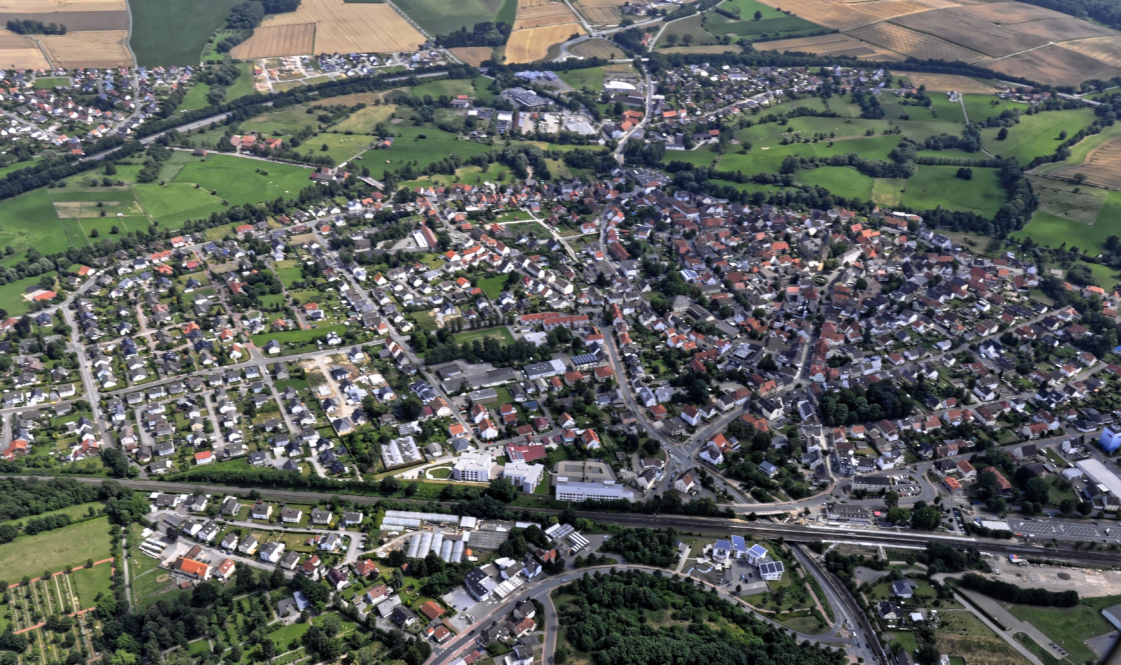 Bilder vom Flug Nordholz-Hammelburg 2015: Steinheim